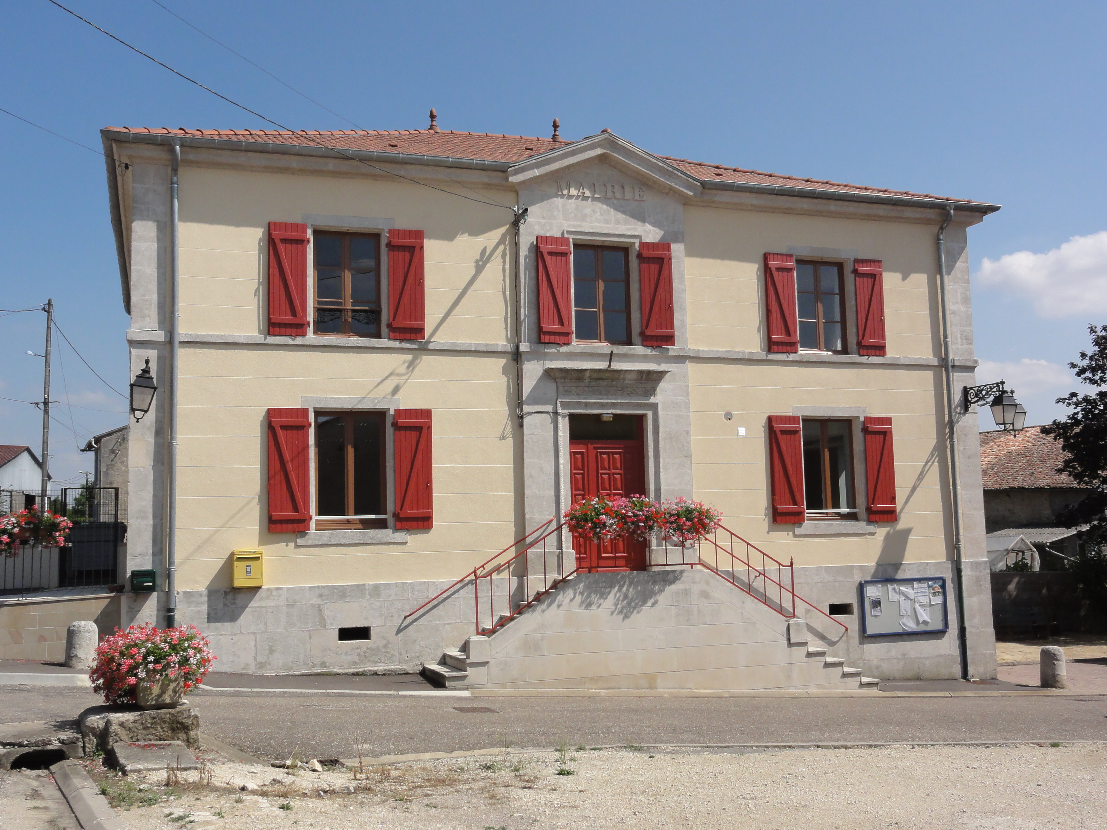 Pont-sur-Meuse (Meuse) mairie